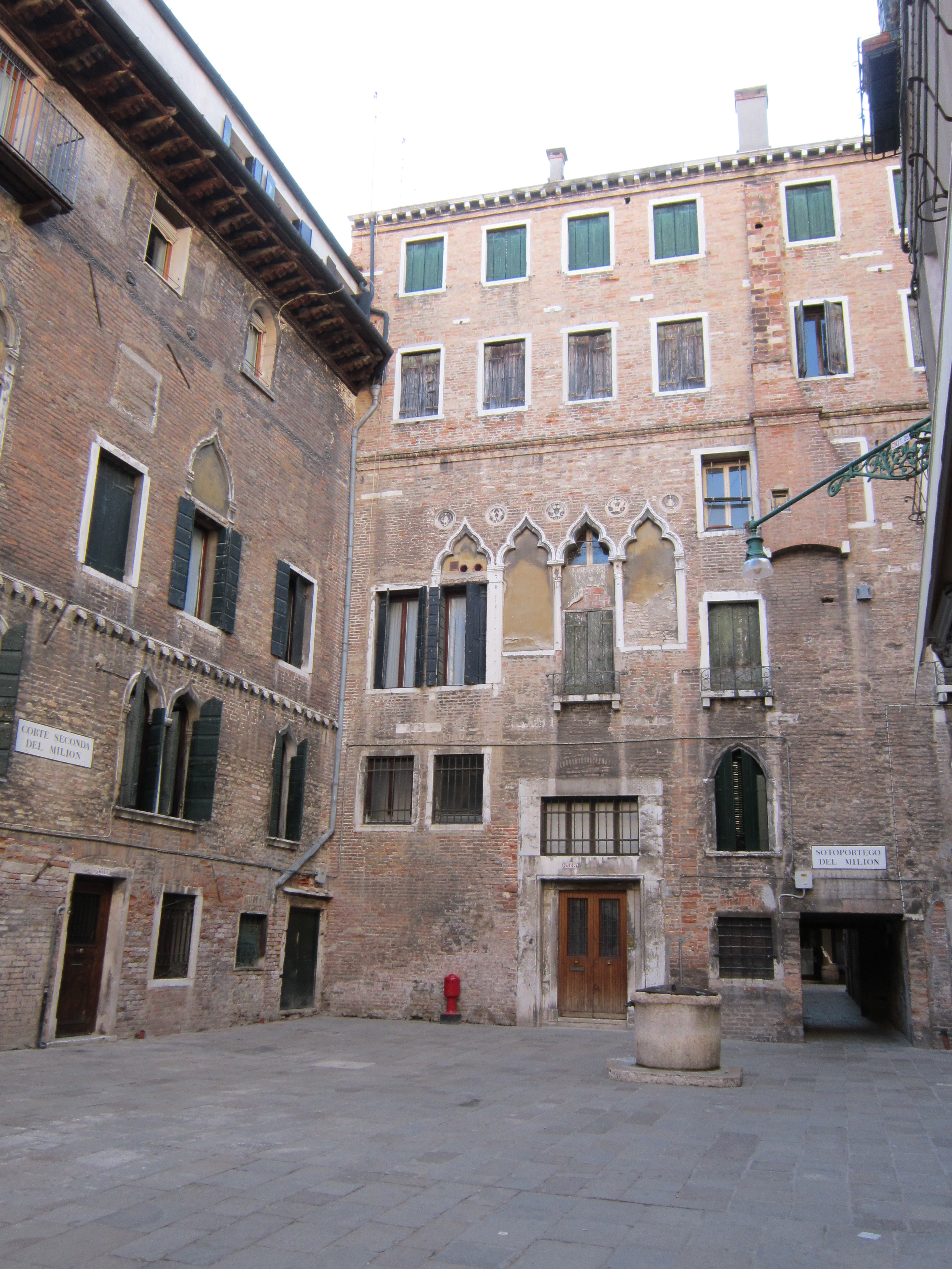 Venezia - Corte del Milion